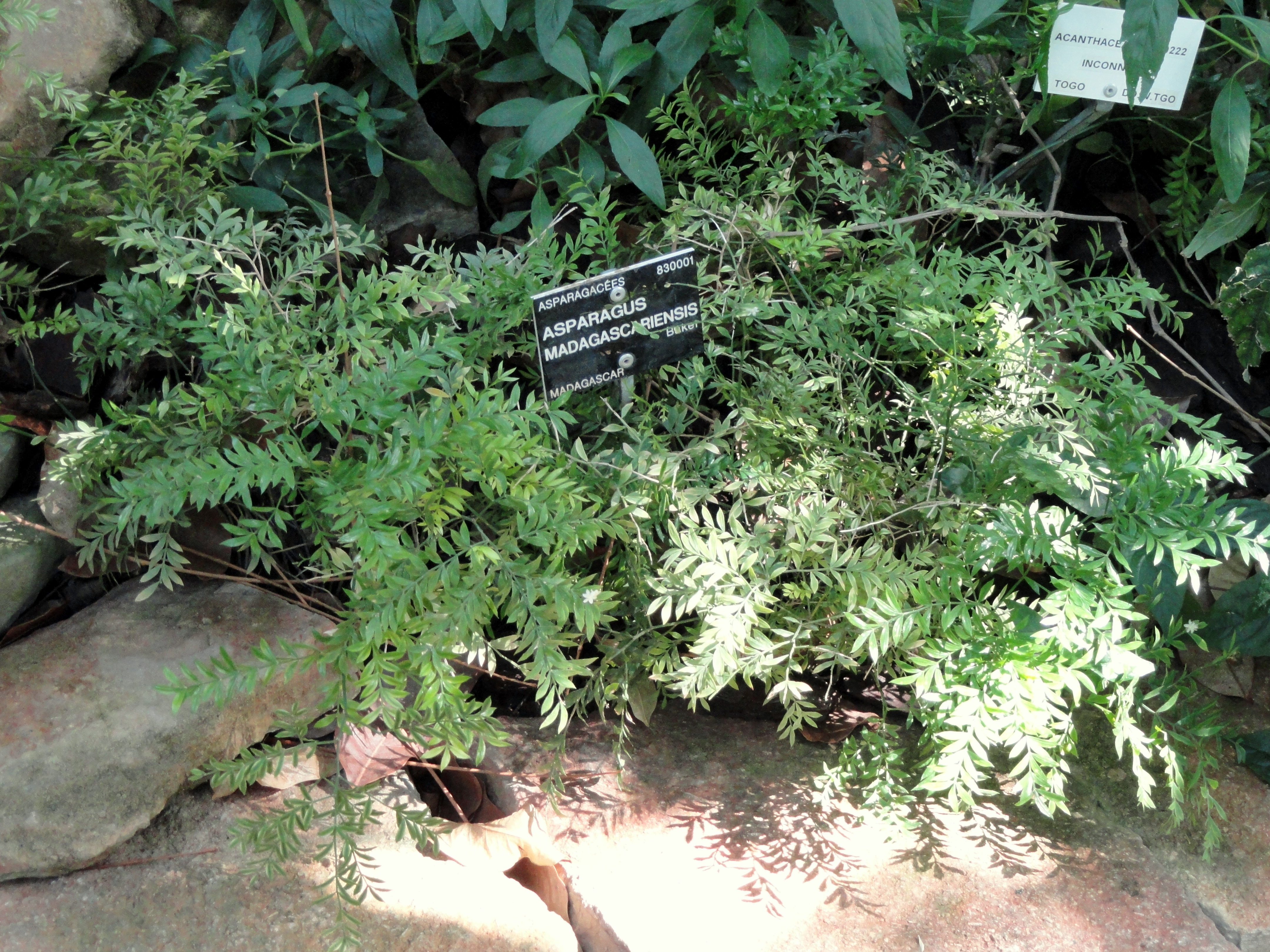 Asparagus madagascariensis specimen in the Jardin Botanique de Lyon, Parc de la Tête d'Or, Lyon, France.